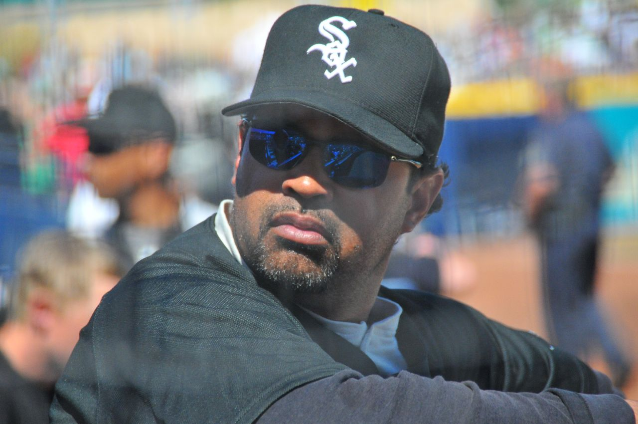 Ozzie GuillénOzzie Guillen